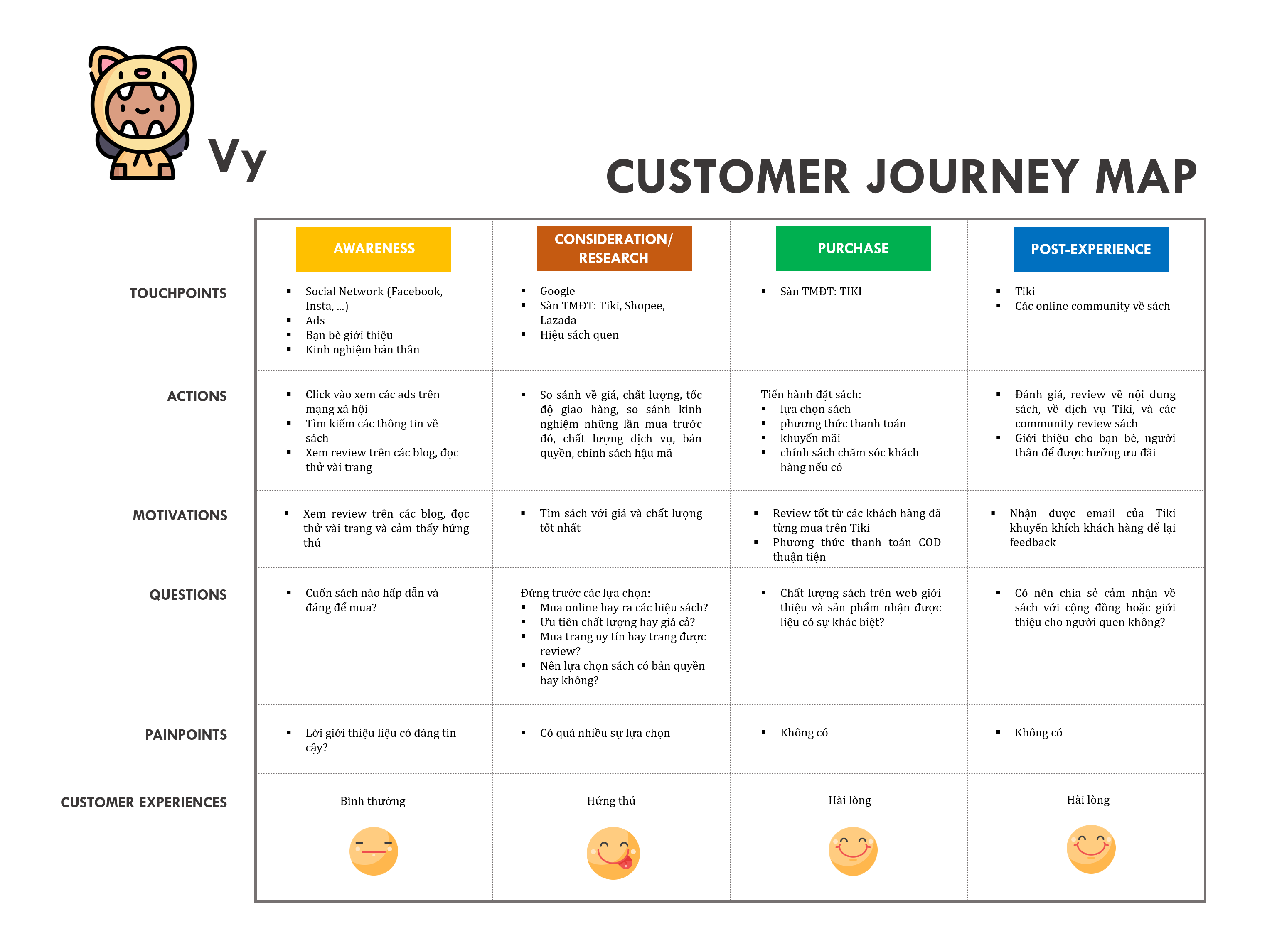 Nội dung bên trong bao gồm các thông tin bao gồm toàn bộ trải nghiệm của khách hàng qua việc mua sách thông qua các trang thương mại điện tử